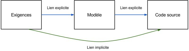 Schéma expliquant les relations explicites/implicites